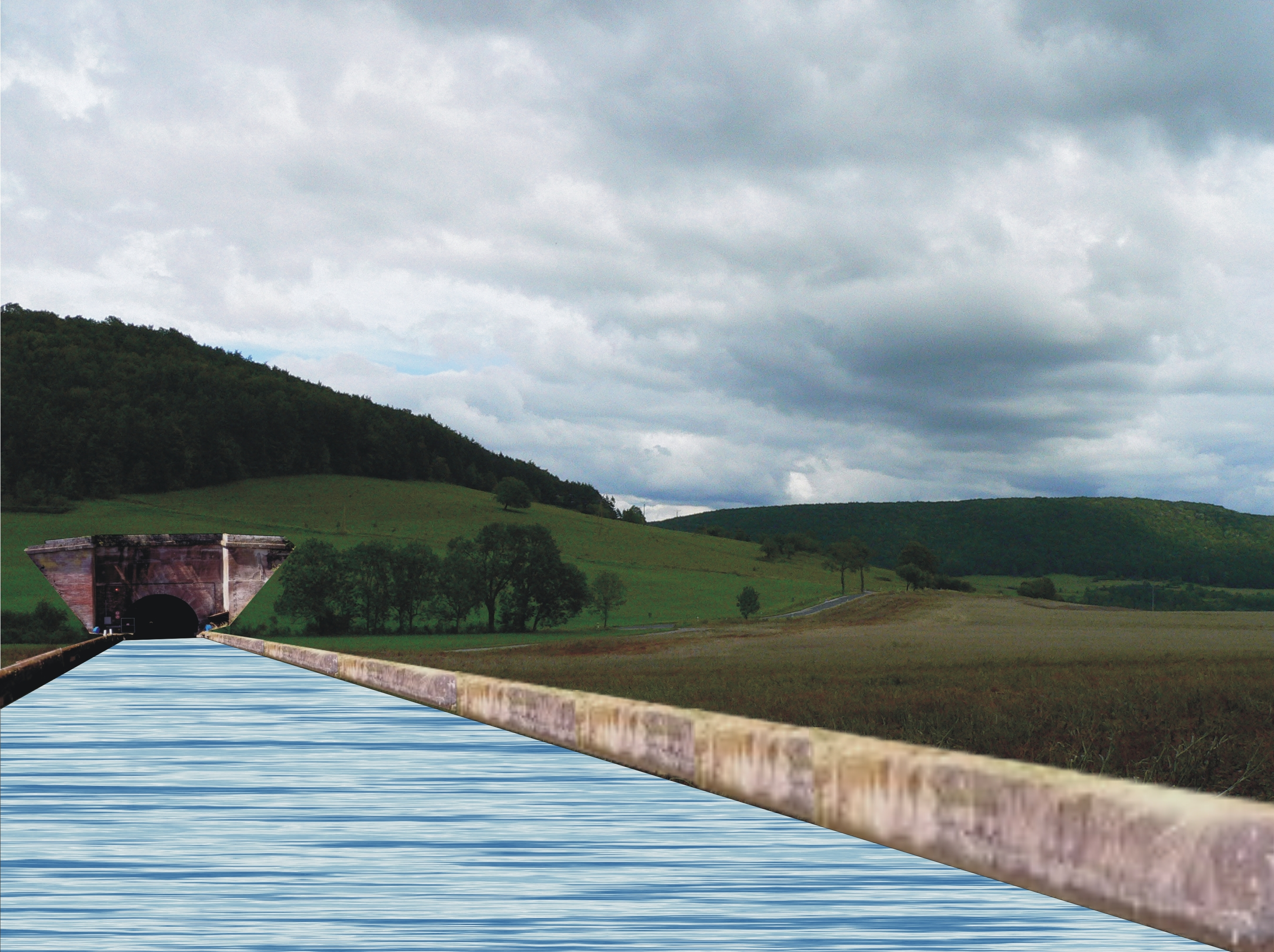 Main-Werra-Kanal (Deutschland): 1940-1961 geplanter möglicher Kanaltunnel durch die Scheitelhaltung (Südportal) südwestlich von Ritschenhausen. Bau des Kanals wurde nie begonnen und 1961 verworfen. Landschaftsfoto real, Kanalverlauf montiert.